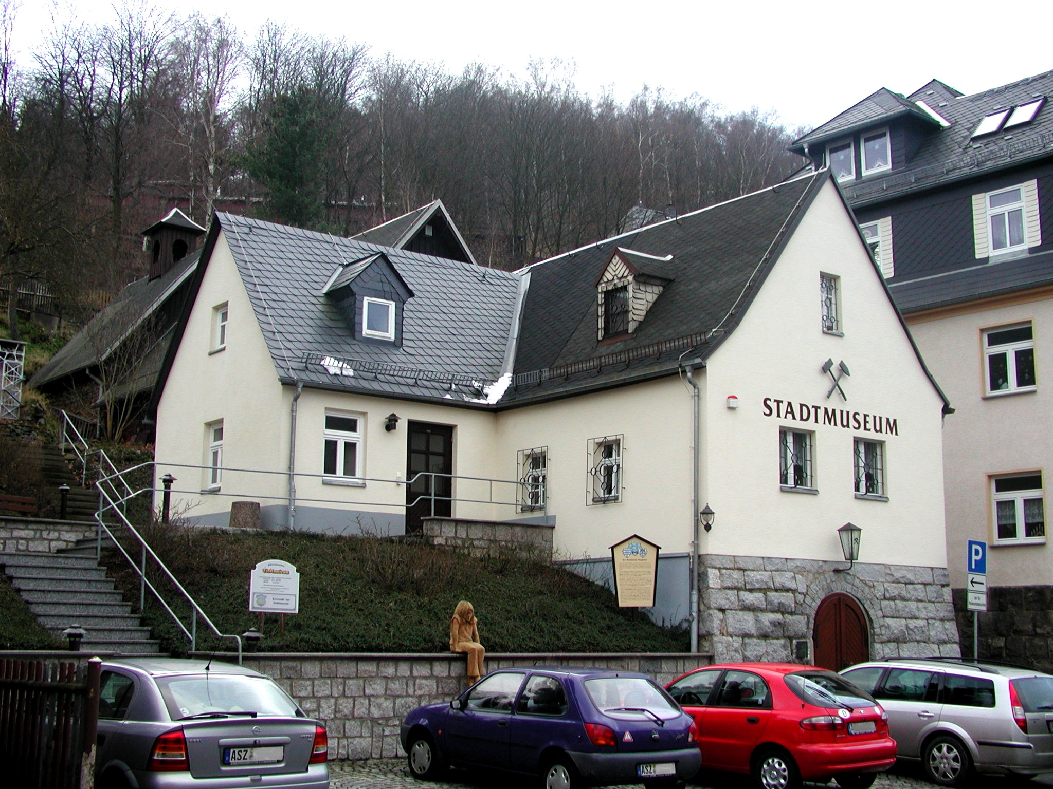 Stadtmuseum Aue